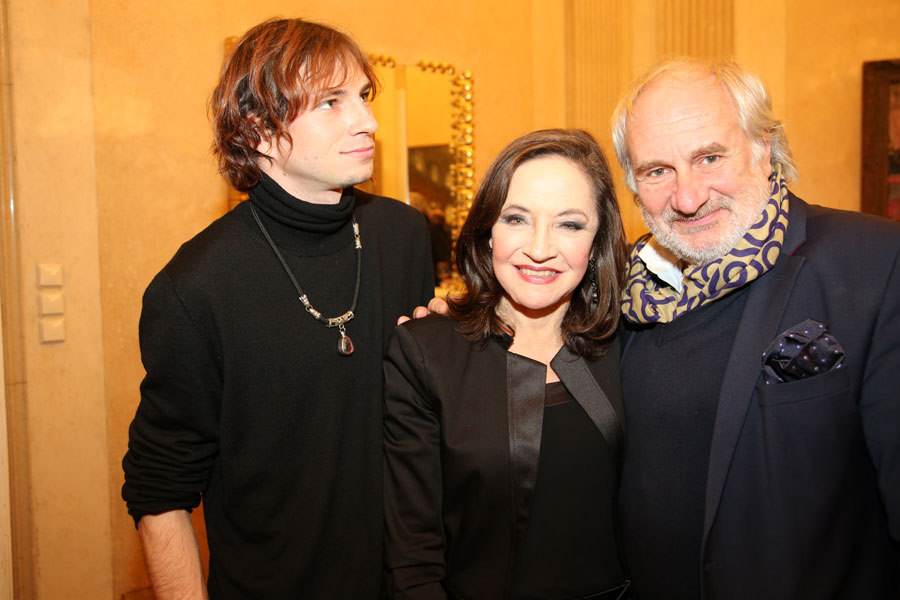 Tany, Maria Bill, Michael Schottenberg-8850